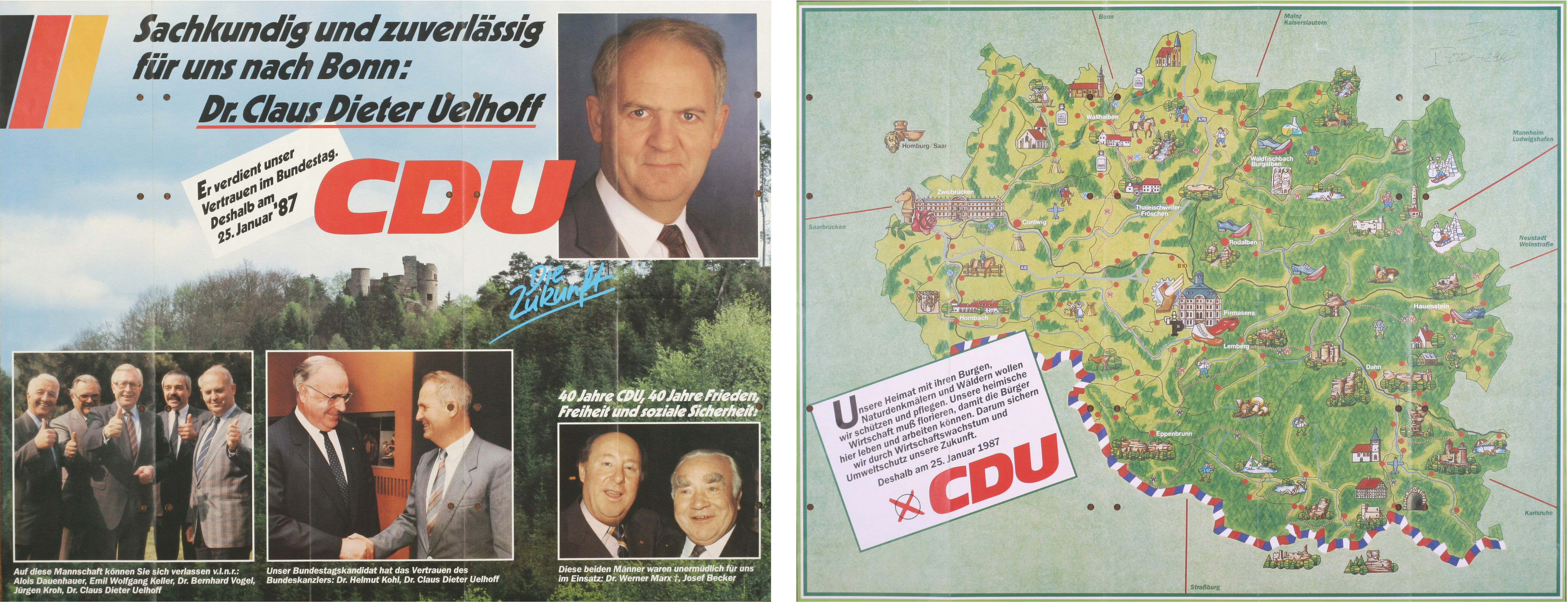 Sachkundig und zuverlässig für uns nach Bonn: Dr. Claus Dieter Uelhoff Er verdient unser Vertrauen im Bundestag. Deshalb am 25. Januar '87 CDU Die Zukunft ... Unsere Heimat mit ihren Burgen Naturdenkmälern und Wäldern wollen wir schützen und pflegen. Unsere heimische Wirtschaft muß florieren, damit die Bürger hier leben und arbeiten können. Darum sichern wir durch Wirtschaftswachstum und Umweltschutz unsere Zukunft. ... Abbildung: Porträtfoto - Fotocollage - Landkarte Kommentar: Beidseitig bedruckte Wandzeitung Zusammen mit Uelhoff sind u.a. abgebildet: Bernhard Vogel, Helmut Kohl, Werner Marx und Josef Becker Plakatart: Kandidaten-/Personenplakat mit Porträt Objekt-Signatur: 10-001: 2941/1/2 Bestand: Plakate zu Bundestagswahlen (10-001) GliederungBestand10-18: Plakate zu Bundestagswahlen (10-001) » Die 11. Bundestagswahl am 25. Januar 1987 » CDU » Mit Porträtfoto Lizenz: KAS/ACDP 10-001: 2941/1/2 CC-BY-SA 3.0 DE